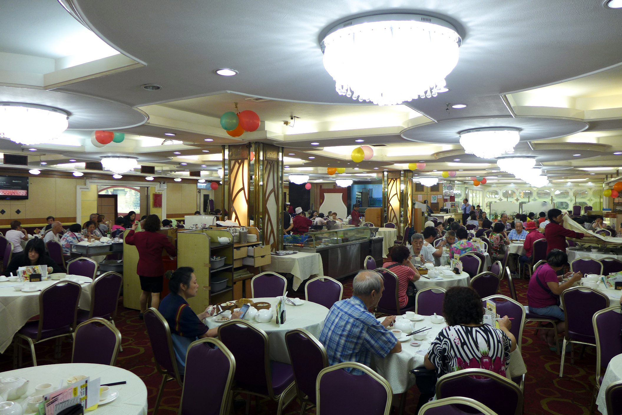 Cheung Hong Restaurant